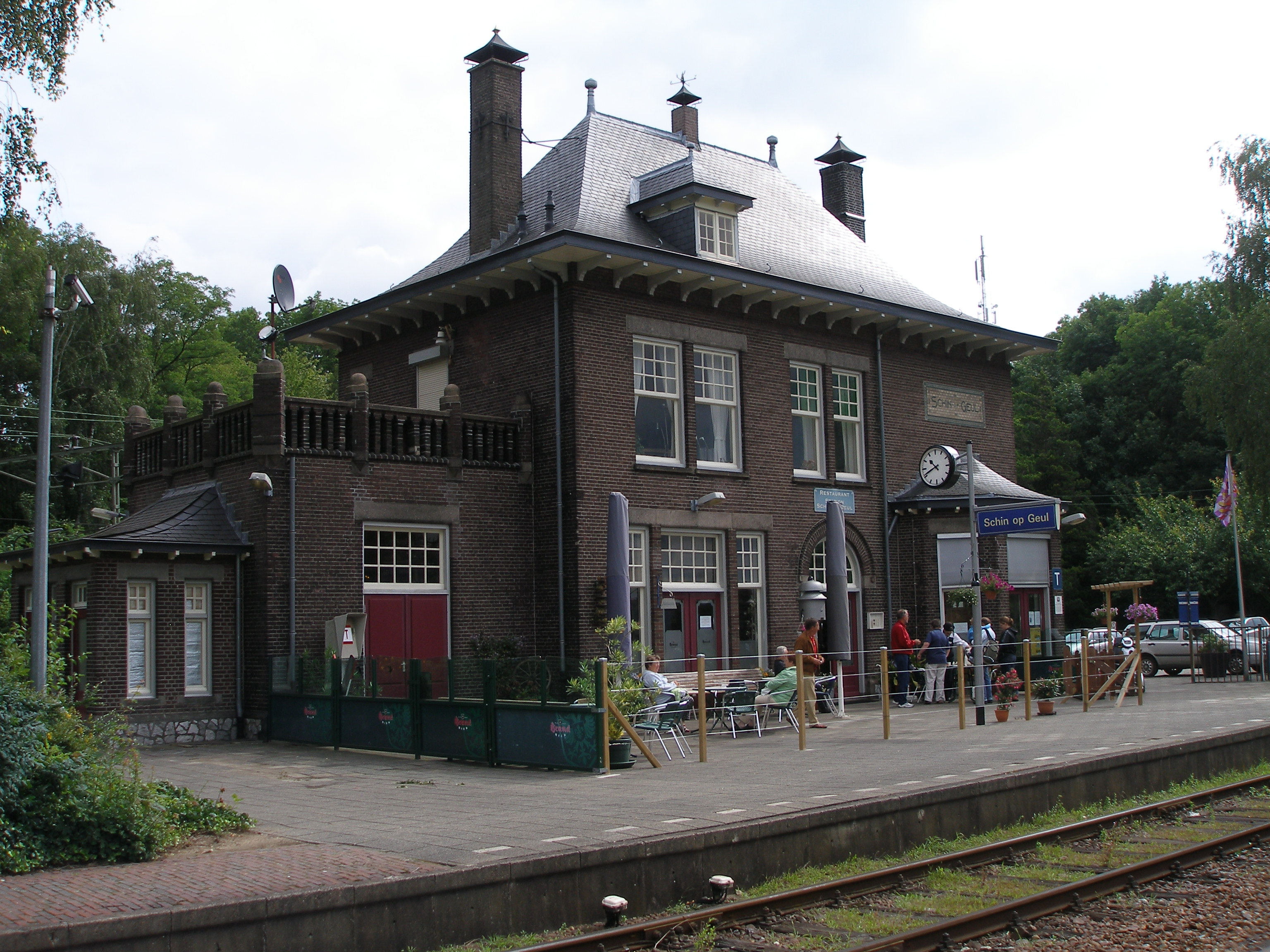 Station Schin op Geul (2008)